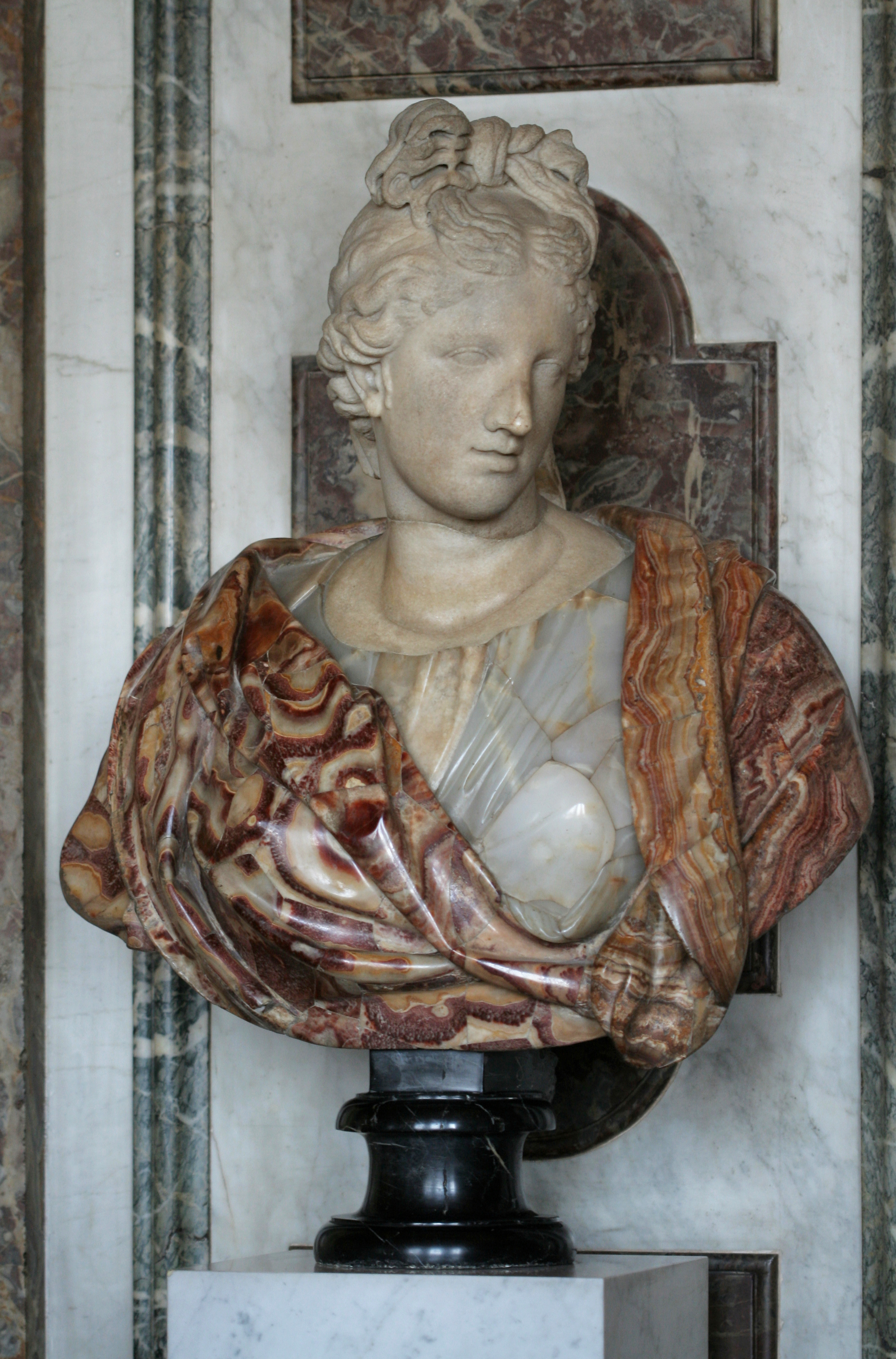 Château de Versailles, salon de Diane, buste antique sur piédouche de dame romaine en marbre polychrome. Tête en marbre blanc, chemise en onyx d'Égypte ou d'Asie Mineure. tunique en brocatelle de Sienne (?). Mur : marqueterie de marbres : encadrement en Campan grand mélange, le fond en Carrare, avec des panneaux en marbre de Rance.